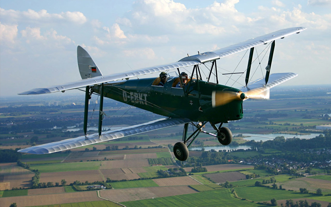 Die D.H.82a Tiger Moth D-EBKT über Oppenheim